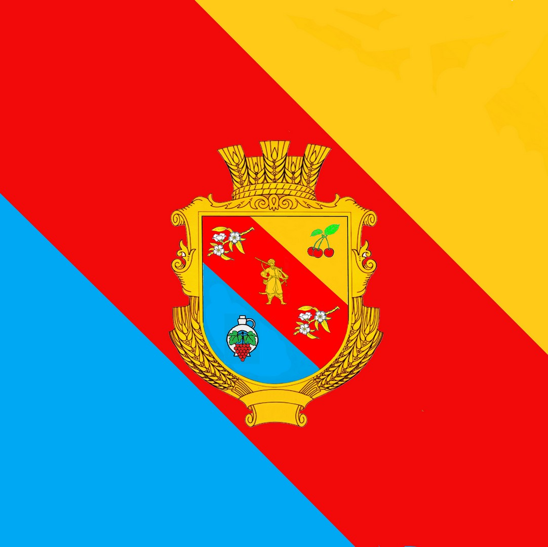 Прапор села Градениці Біляївського району Одеської області